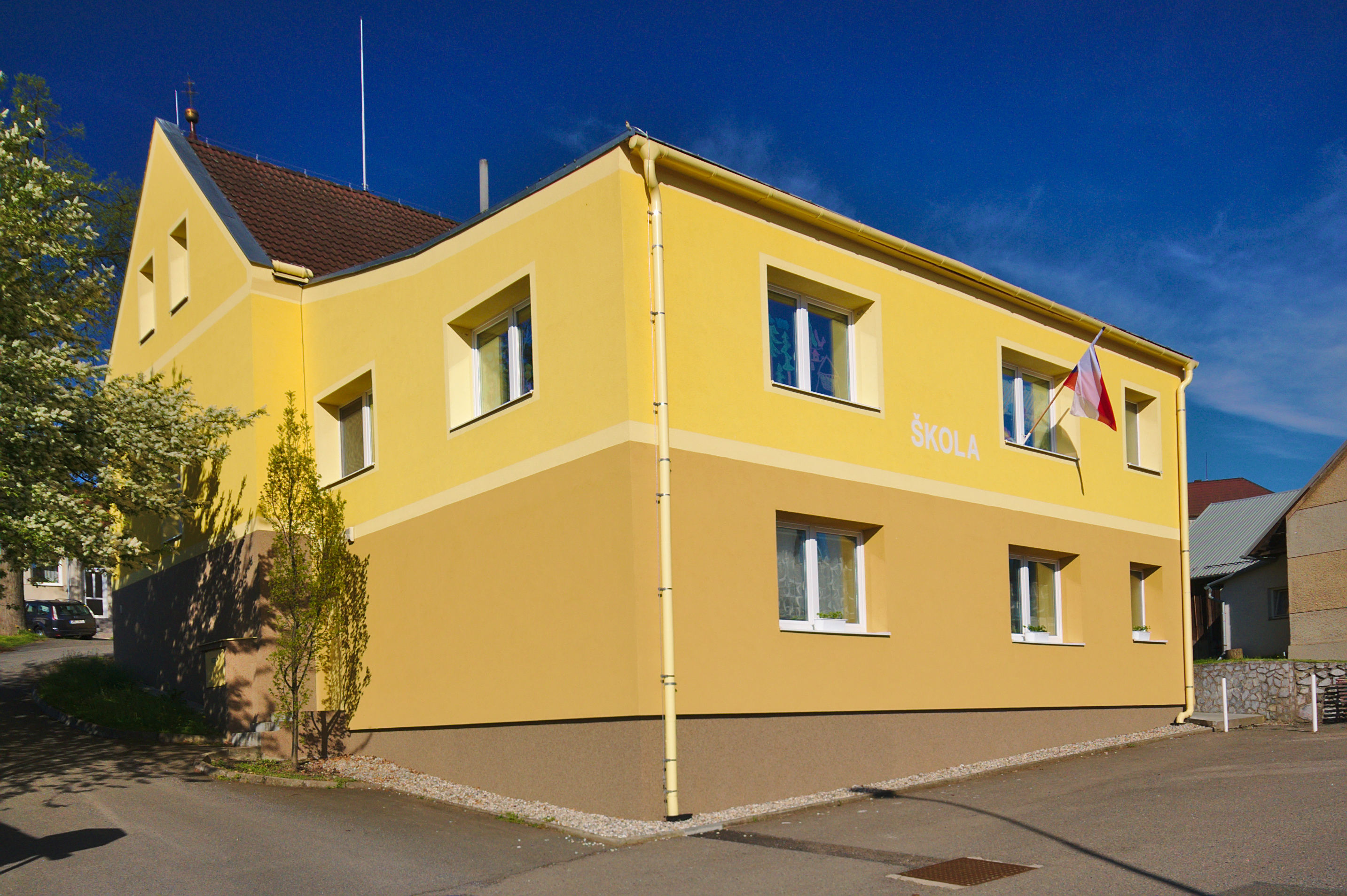 Základní škola, Lipová, okres Prostějov